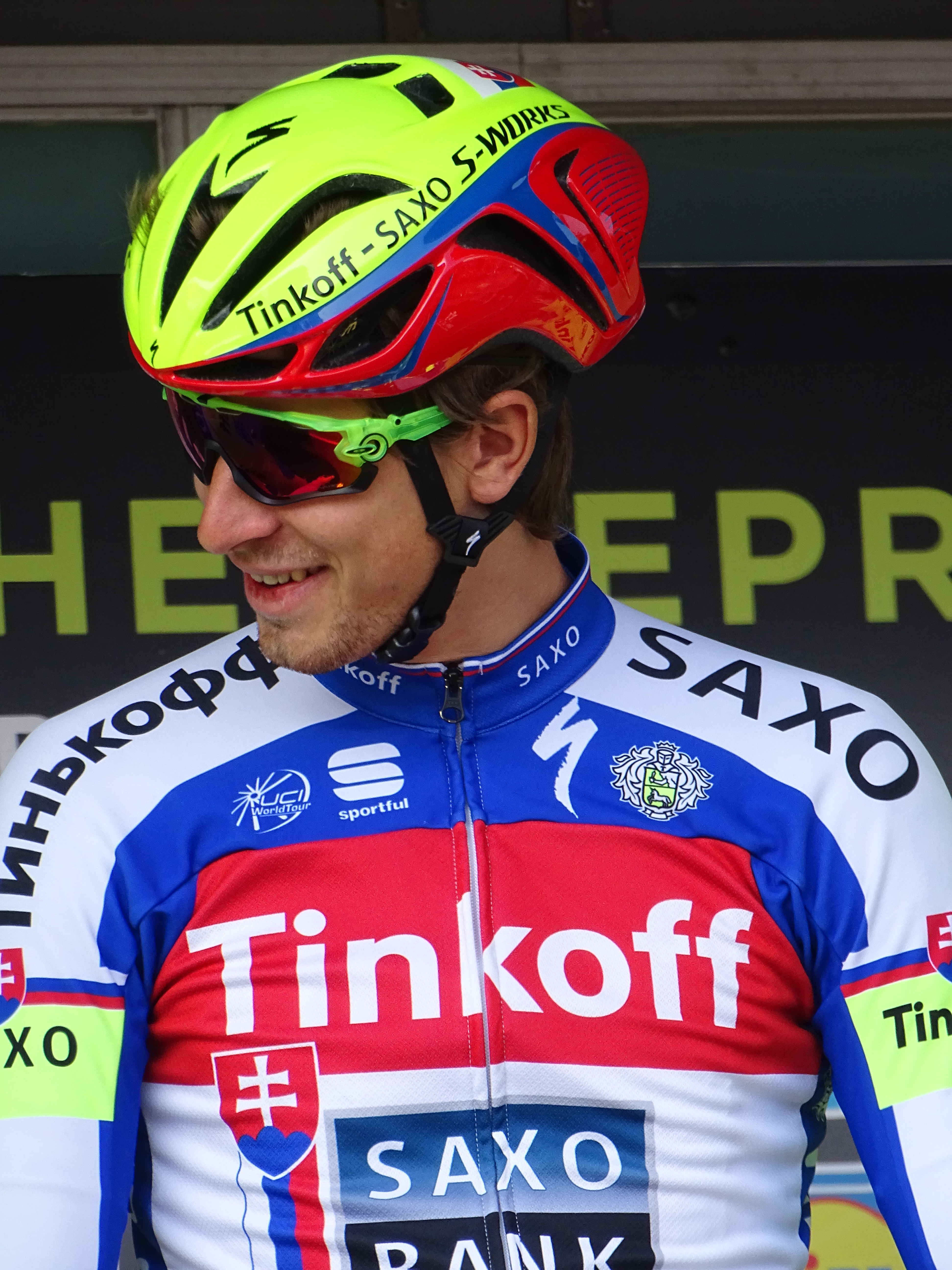 Reportage réalisé le mercredi 8 avril à l'occasion du départ du Grand Prix de l'Escaut 2015 à Anvers, Belgique.